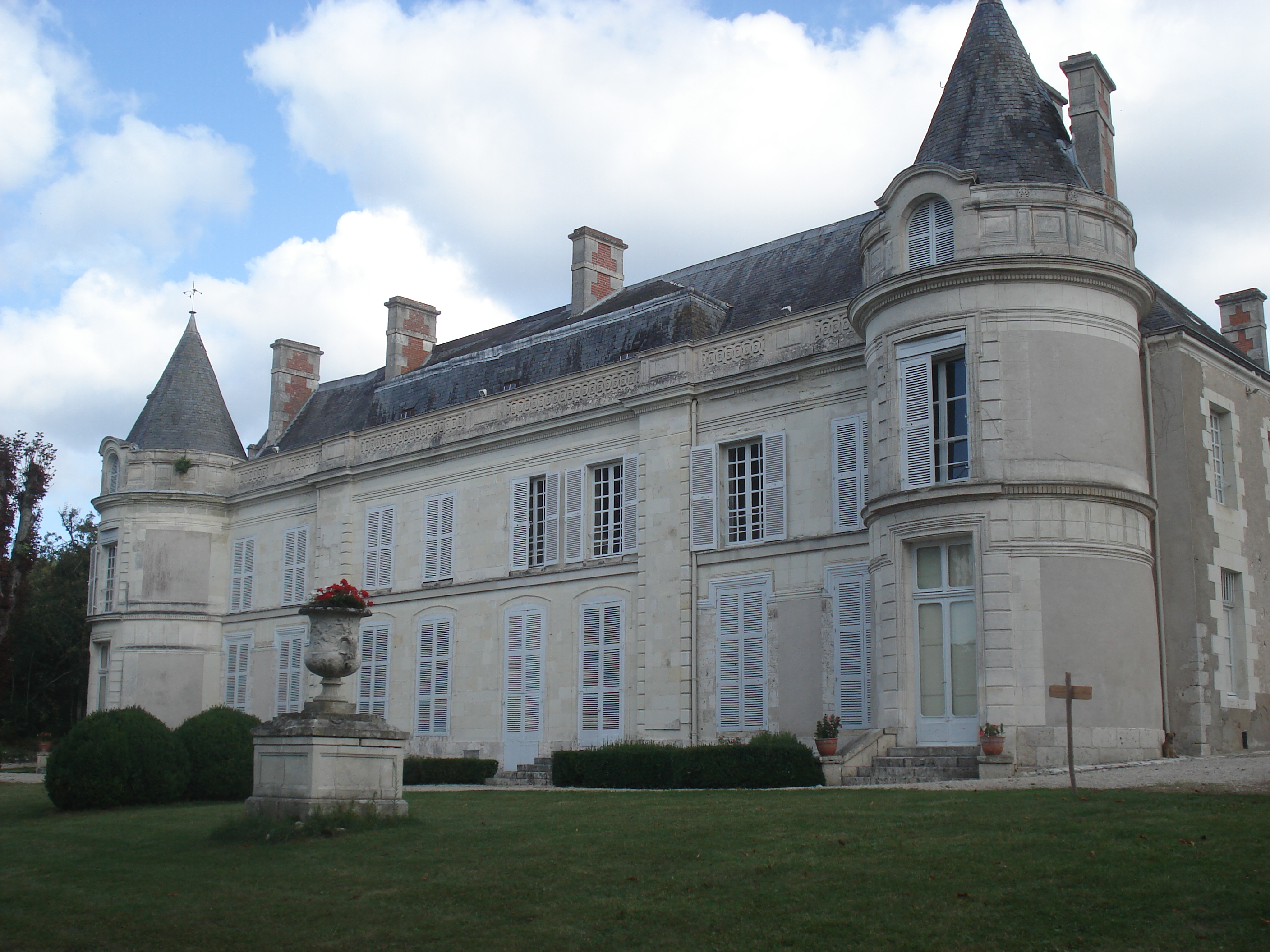 Façade du Château de Villelouet (Chailles, 41).